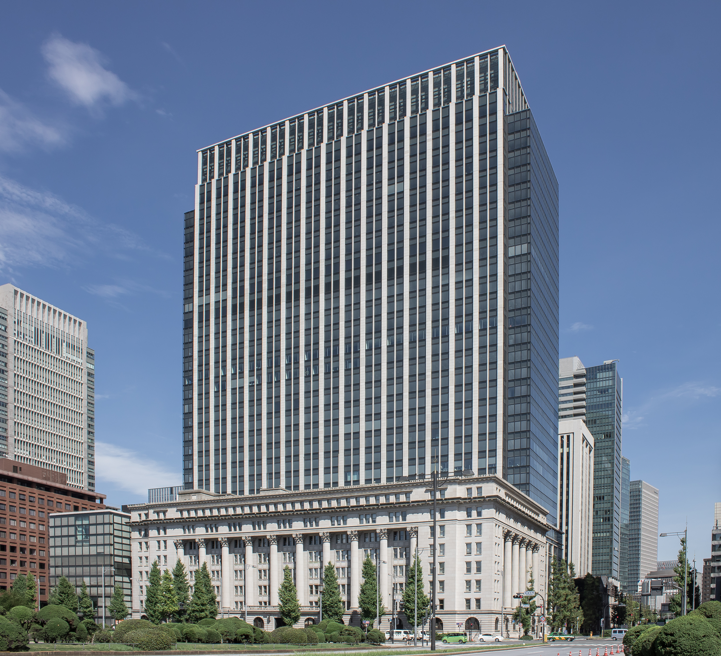 明治生命館（重要文化財）。明治安田生命本社ビル。東京都千代田区。